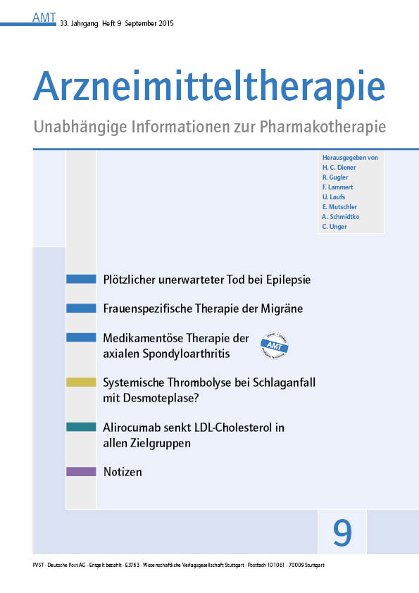 Titelseite der Zeitschrift Arzneimitteltherapie September 2015